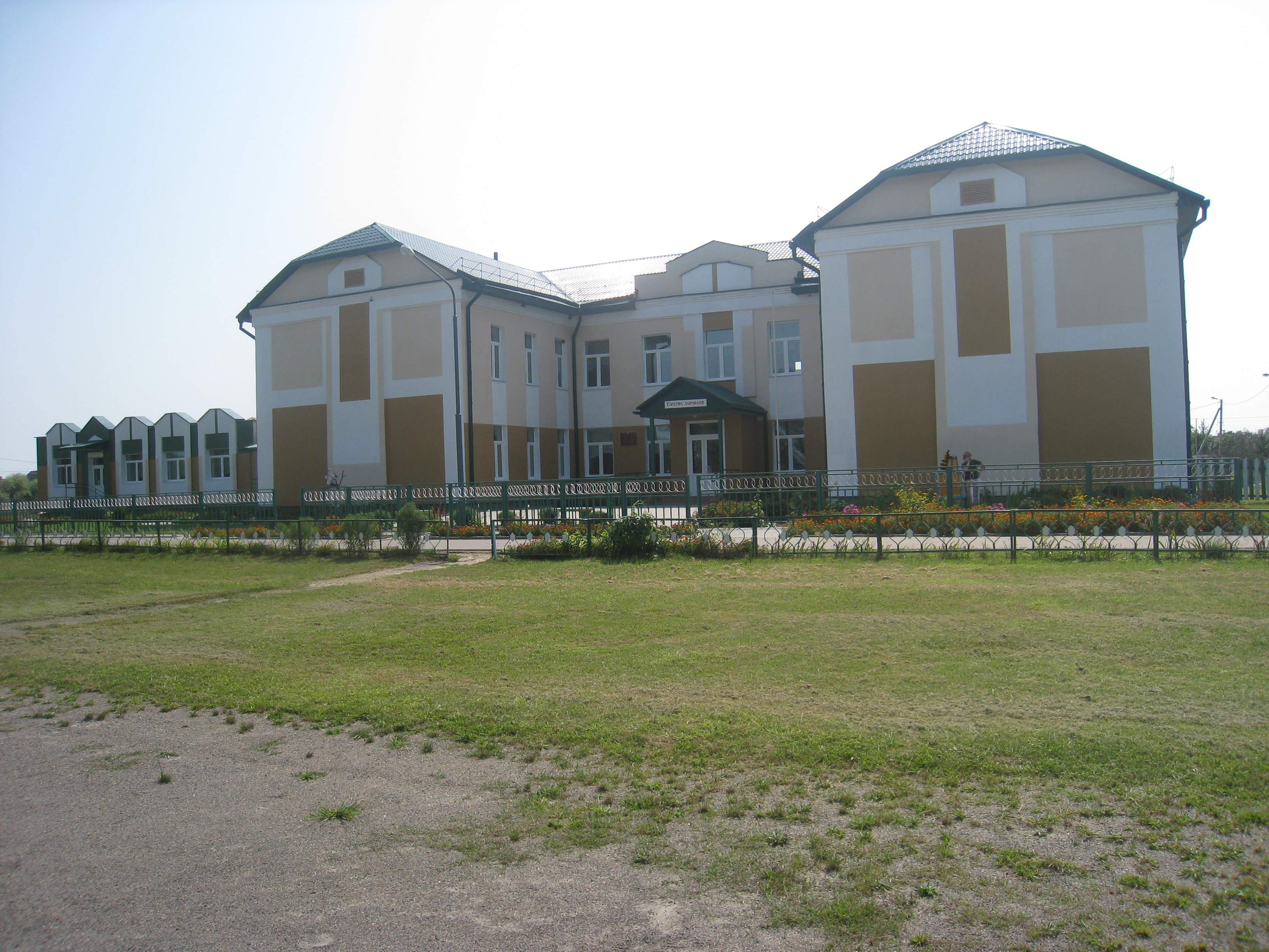 Верасніца (Жыткавіцкі раён, Гомельская вобласць). Школа. Беларуская (тарашкевіца): Верасьніца (Жыткавіцкі раён, Гомельская вобласьць). Школа.